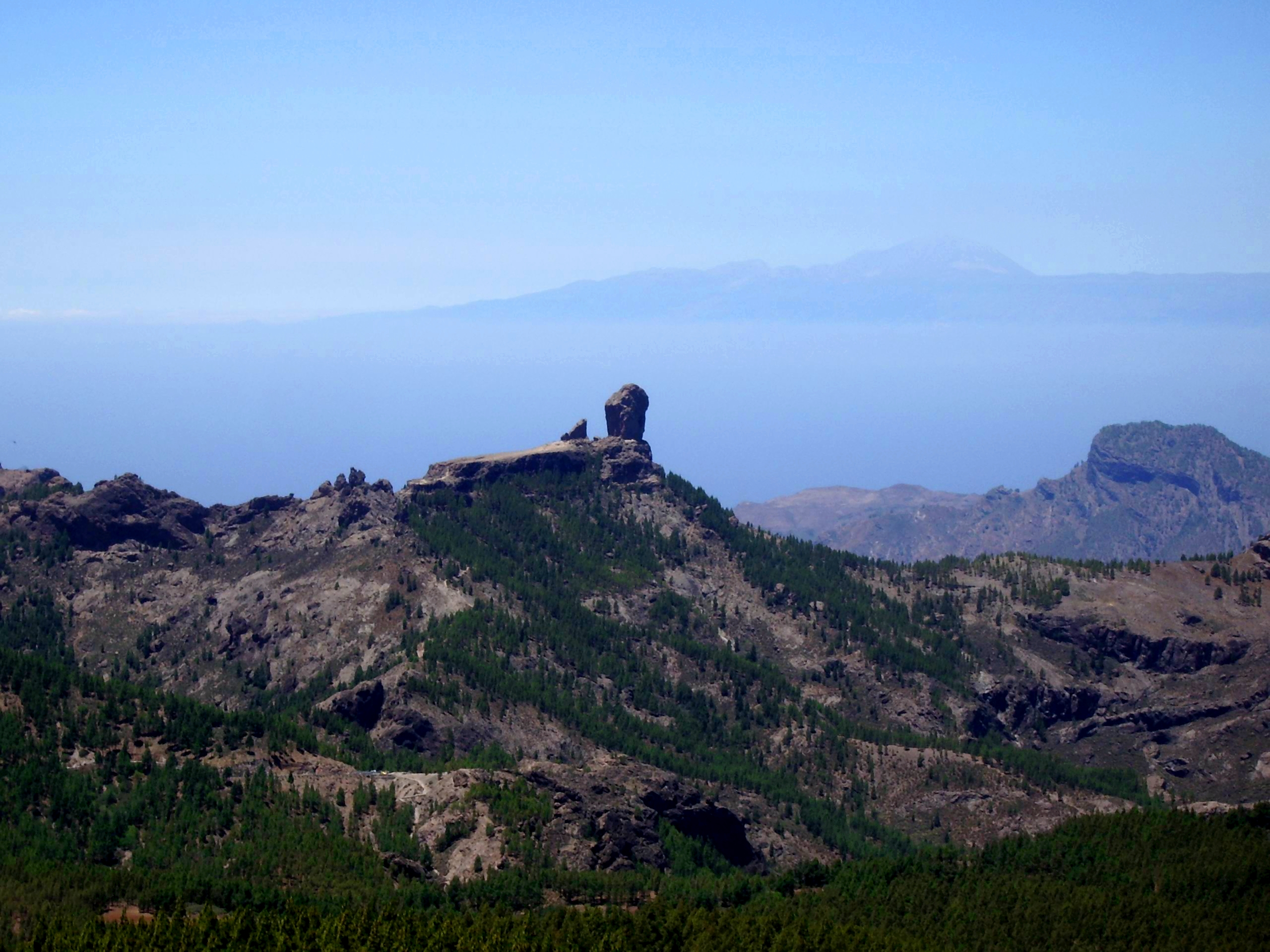 Paisaje con el Roque Nublo (Gran Canaria, España) y vista al fondo de la mole del Teide sobre la isla de Tenerife